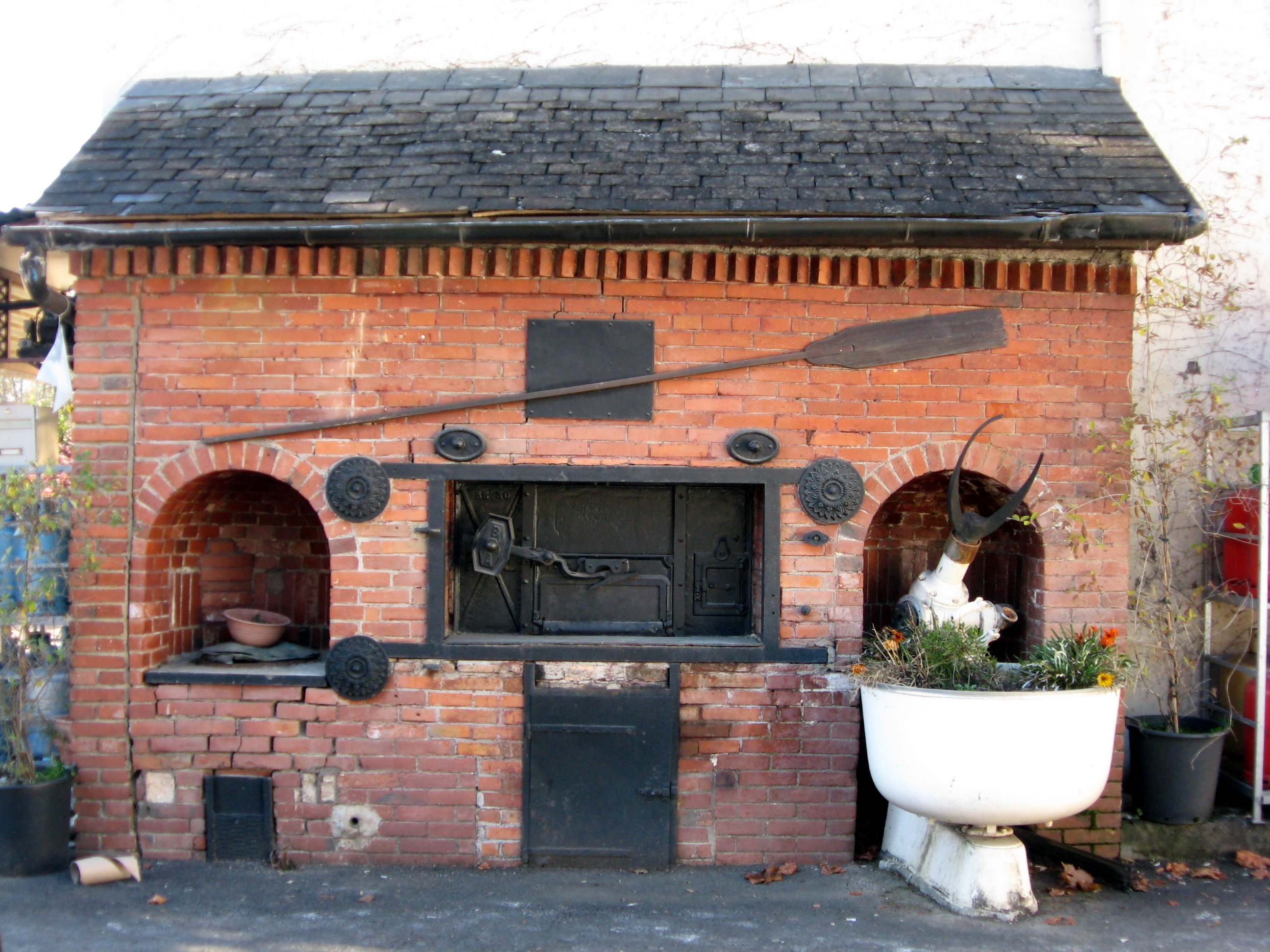 Ancien four à pain restauré à Ogeu-les-Bains (Pyrénées-Atlantiques) (Pyrénées).